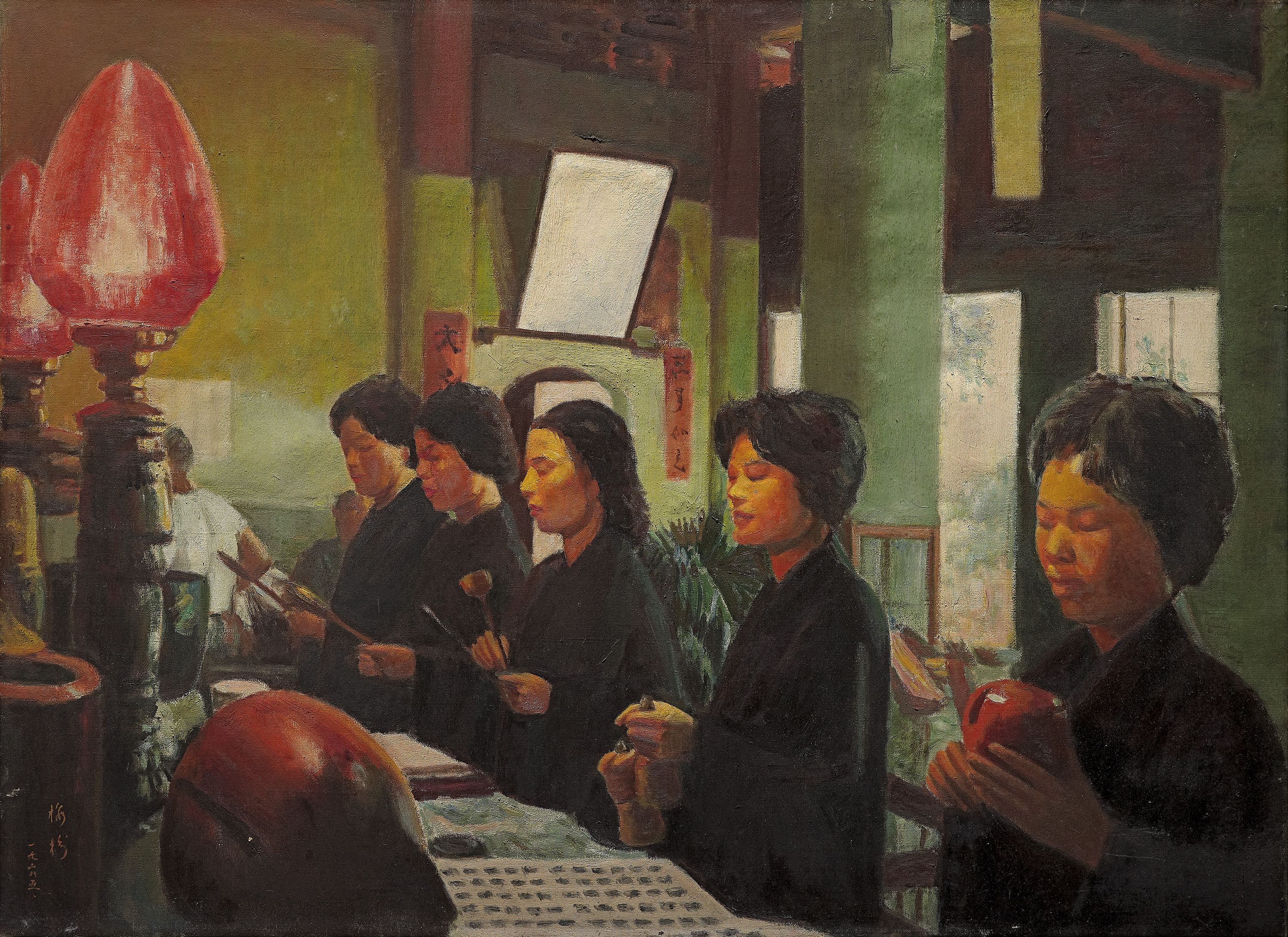 Chanting The Buddhist Scriptures 梵音 1963 油彩 畫布